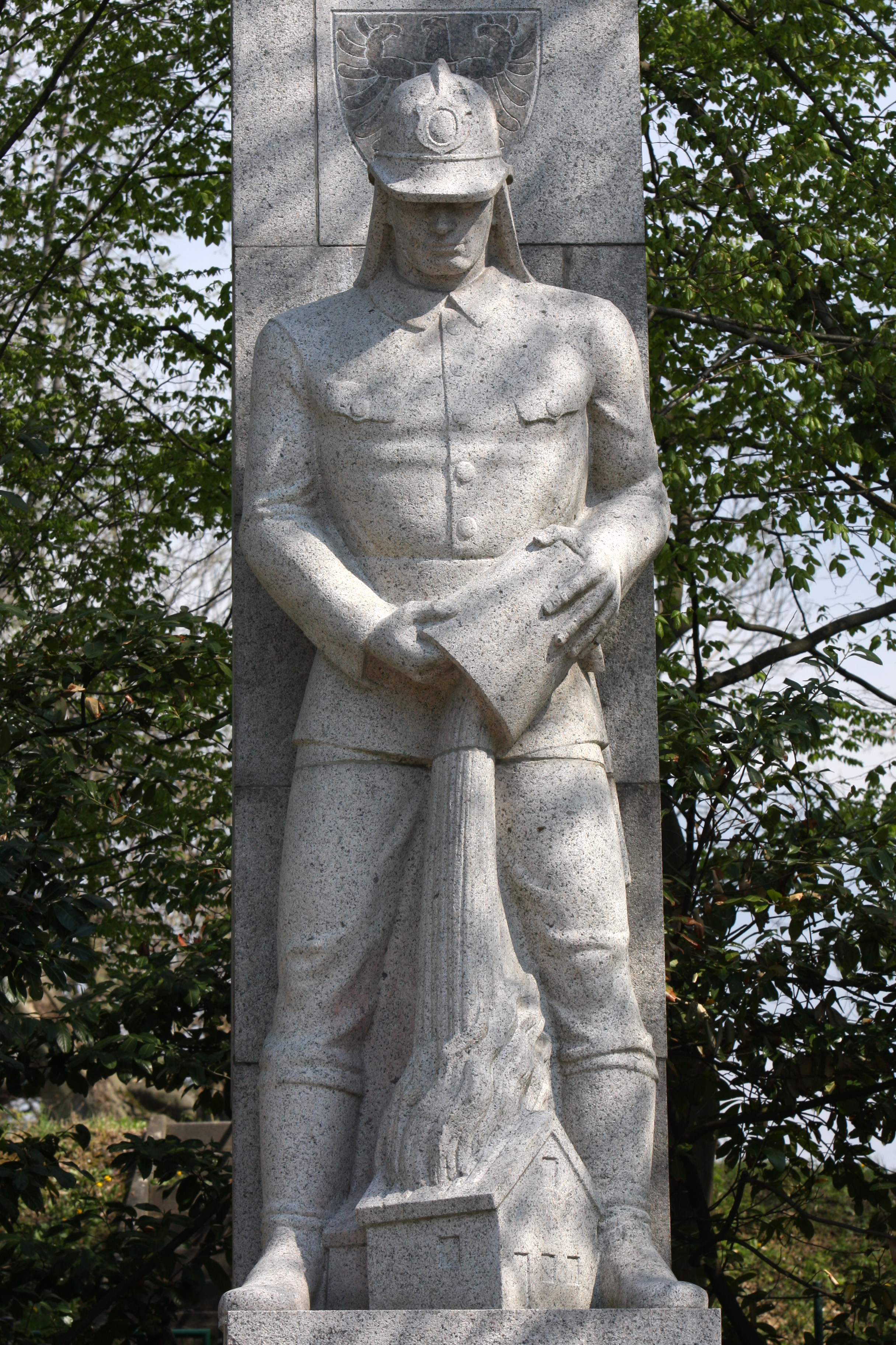 Feuerwehrmann-Figur am Landes-Feuerwehr-Ehrenmal Baden-Württemberg in Achern (Deutschland, Ortenaukreis), 1936 erbaut. Das Denkmal steht zu Ehren der Feuerwehrleute Baden-Württembergs, die ihr Leben im Dienst für den Nächsten verloren haben. Es wurde vom Karlsruher Bildhauer Karl Dietrich nach einem Entwurf des Architekten Franz Kuhn aus Heidelberg gefertigt.